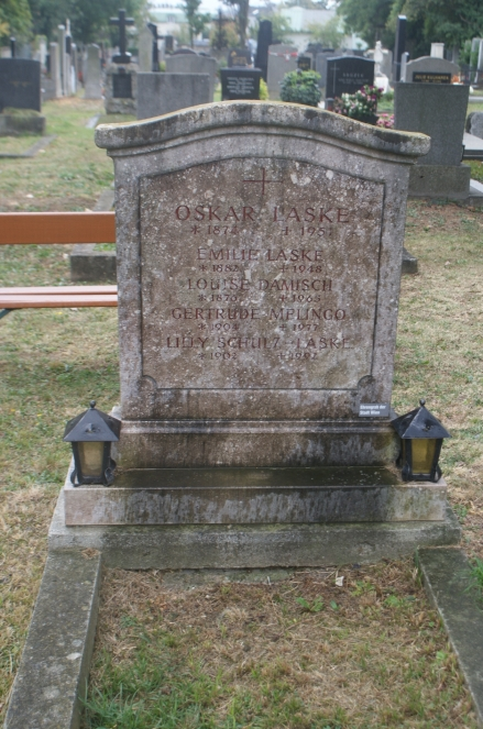 Friedhof Lainz-Oskar Laske